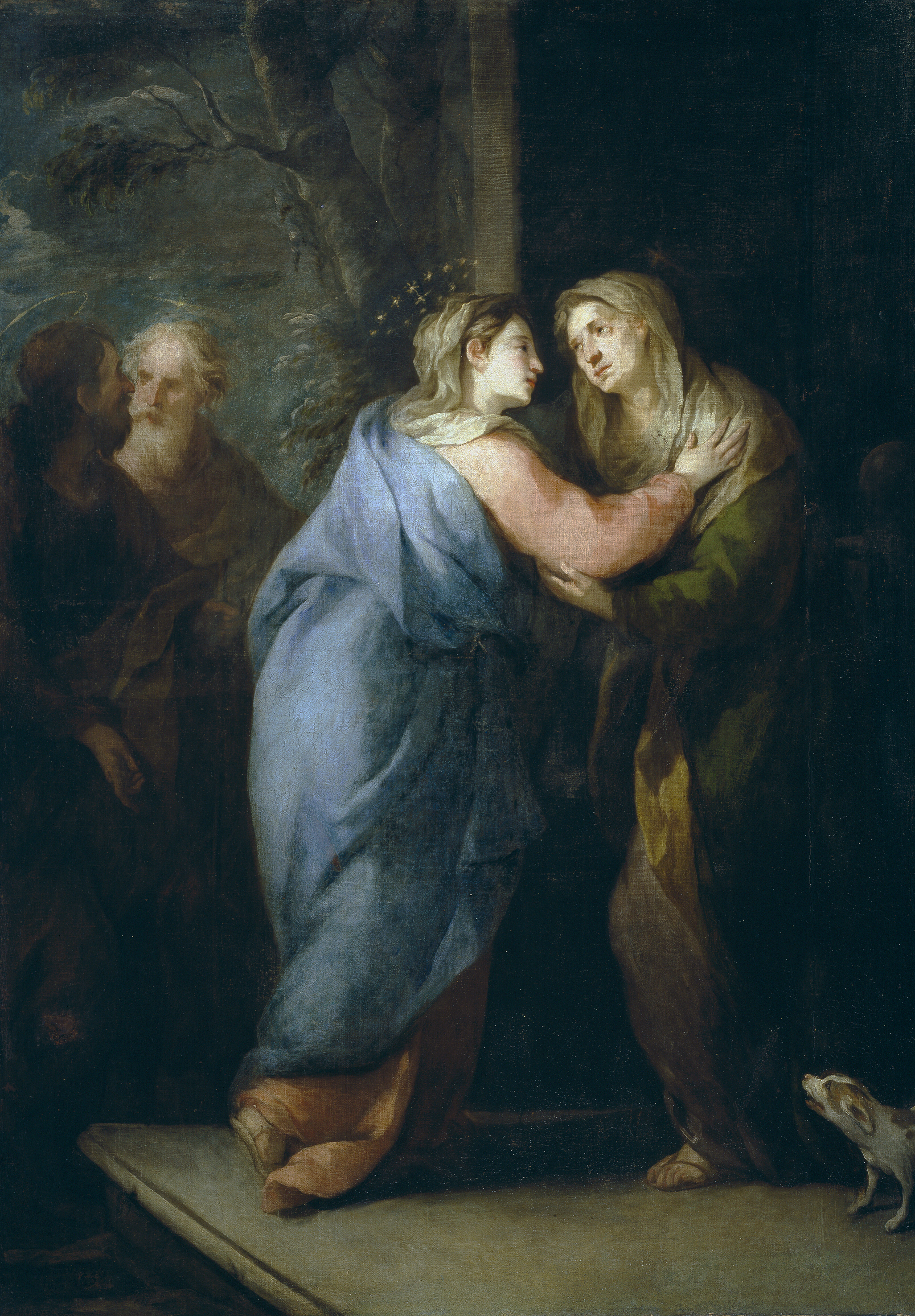 La obra representa a la Virgen María, que estaba embarazada del Niño Jesús, visitando a su prima Santa Isabel, que estaba embarazada a su vez de Juan el Bautista.